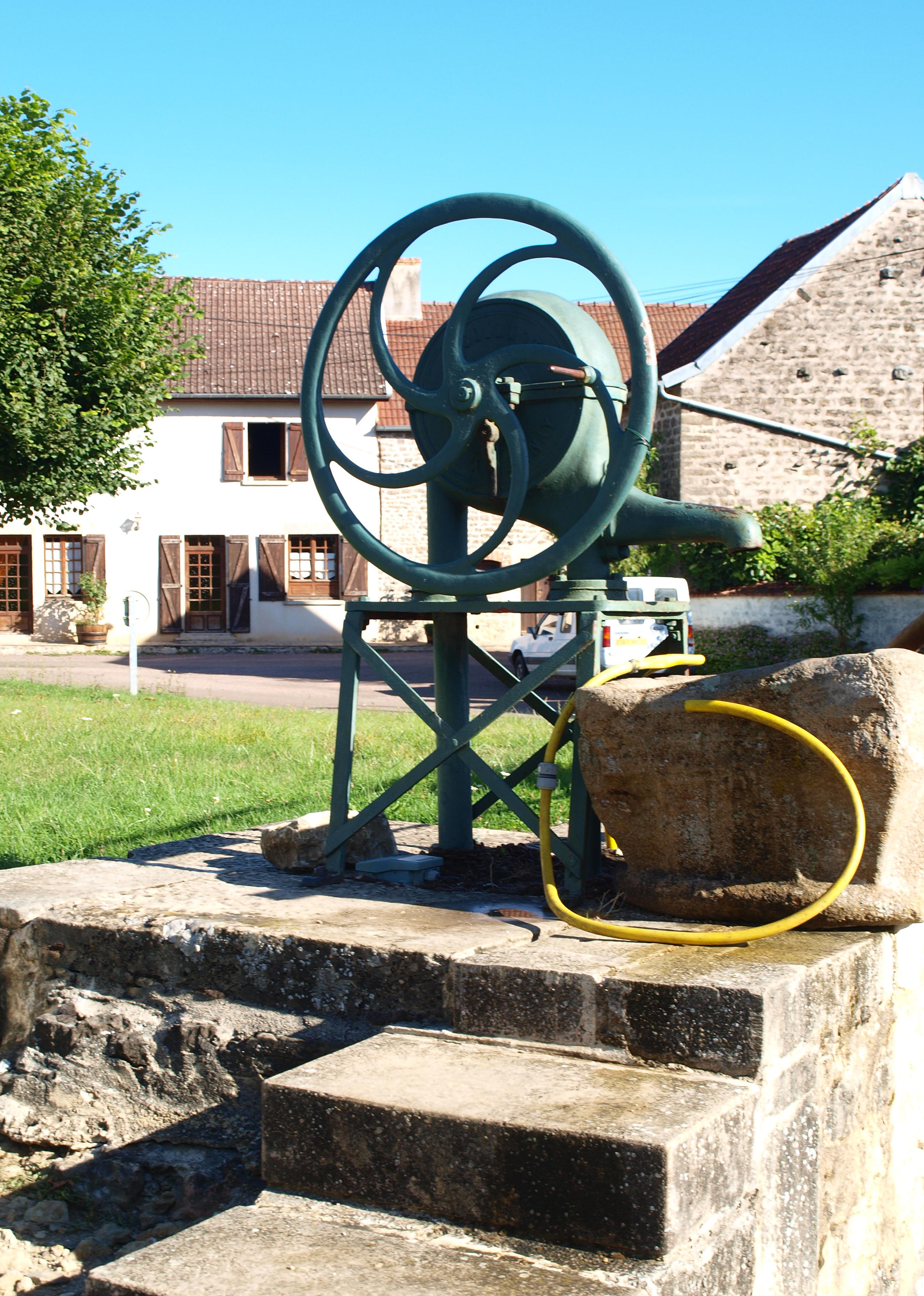 Maconge (Côte d'Or, France) ; la pompe de l'abreuvoir communal.